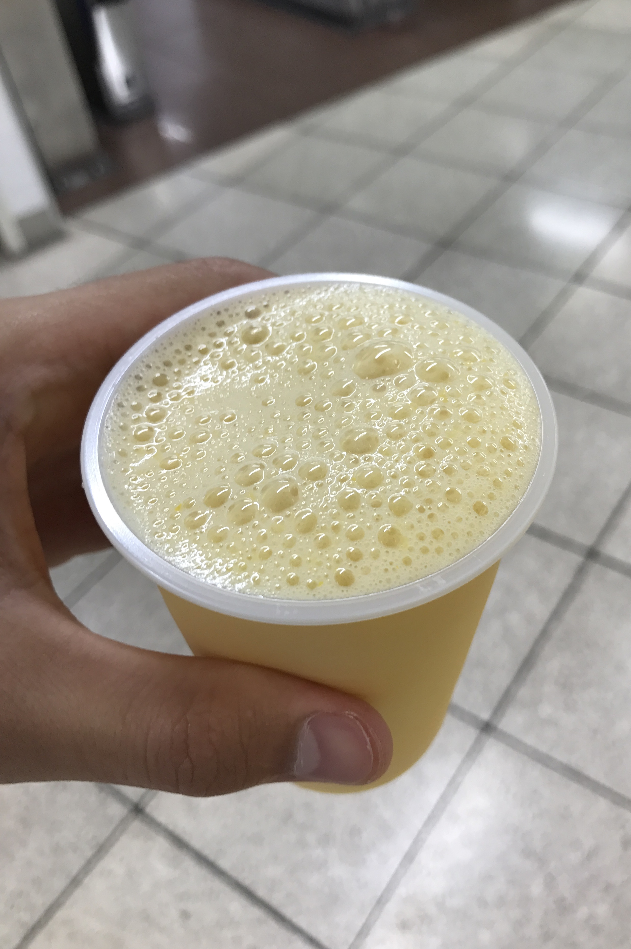 2017年8月1日に阪神電鉄大阪梅田駅で撮影されたミックスジュース（150円）の画像。冷たい。